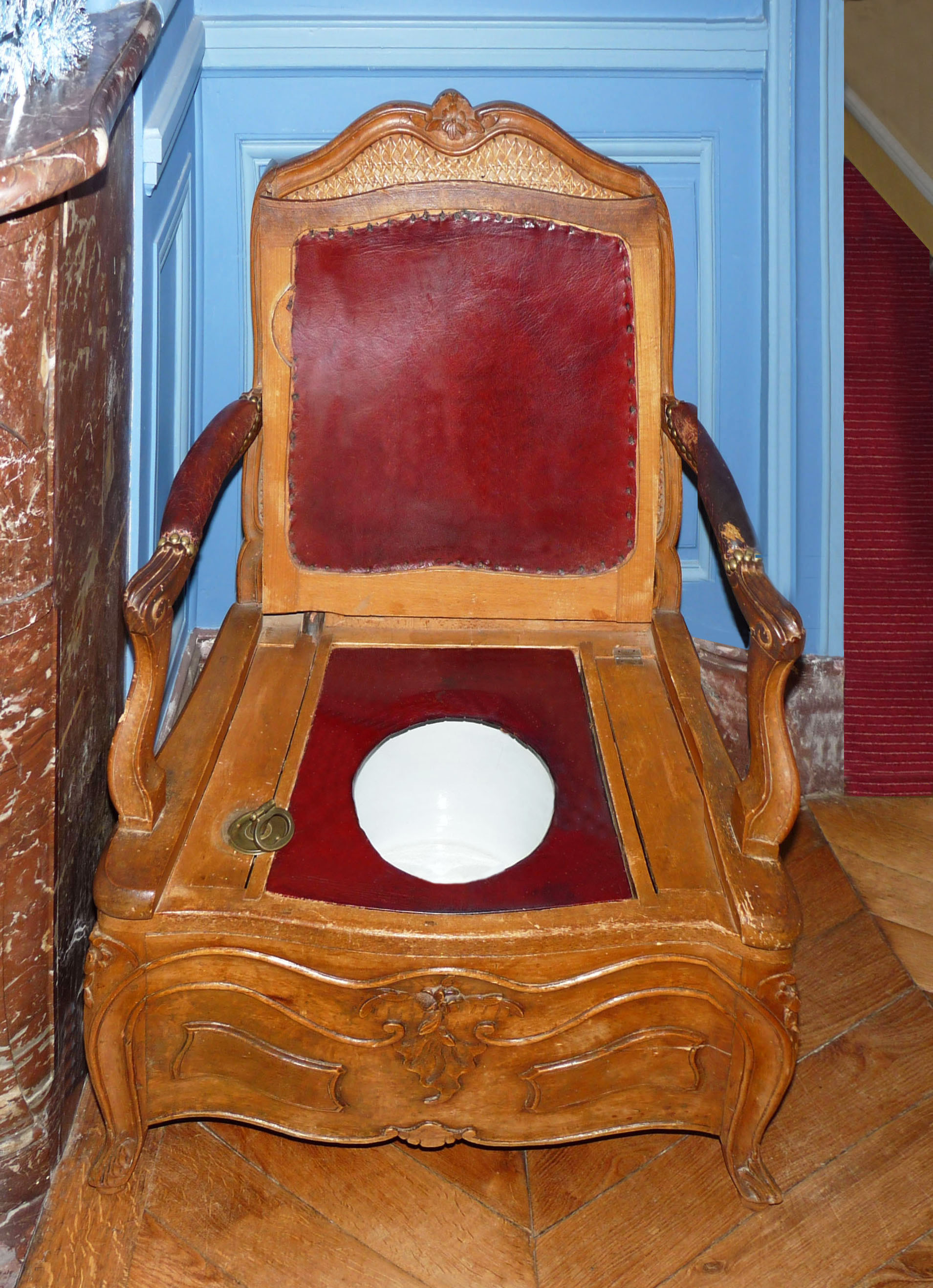 Château de Breteuil en Essonne. Chaise percée du 19 e siècle.